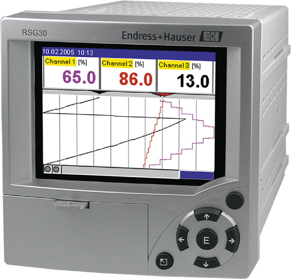 Bildschirmschreiber neuester Generation Ecograph T